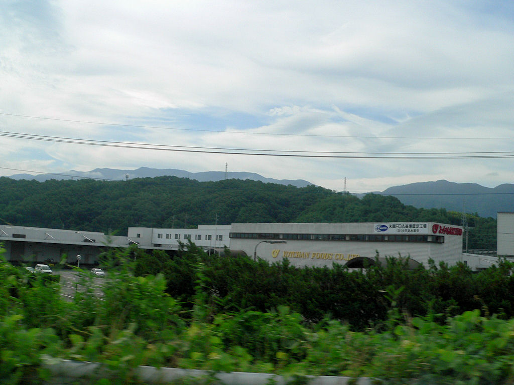 よっちゃん食品工業工場（車移動中、後部座席より撮影）